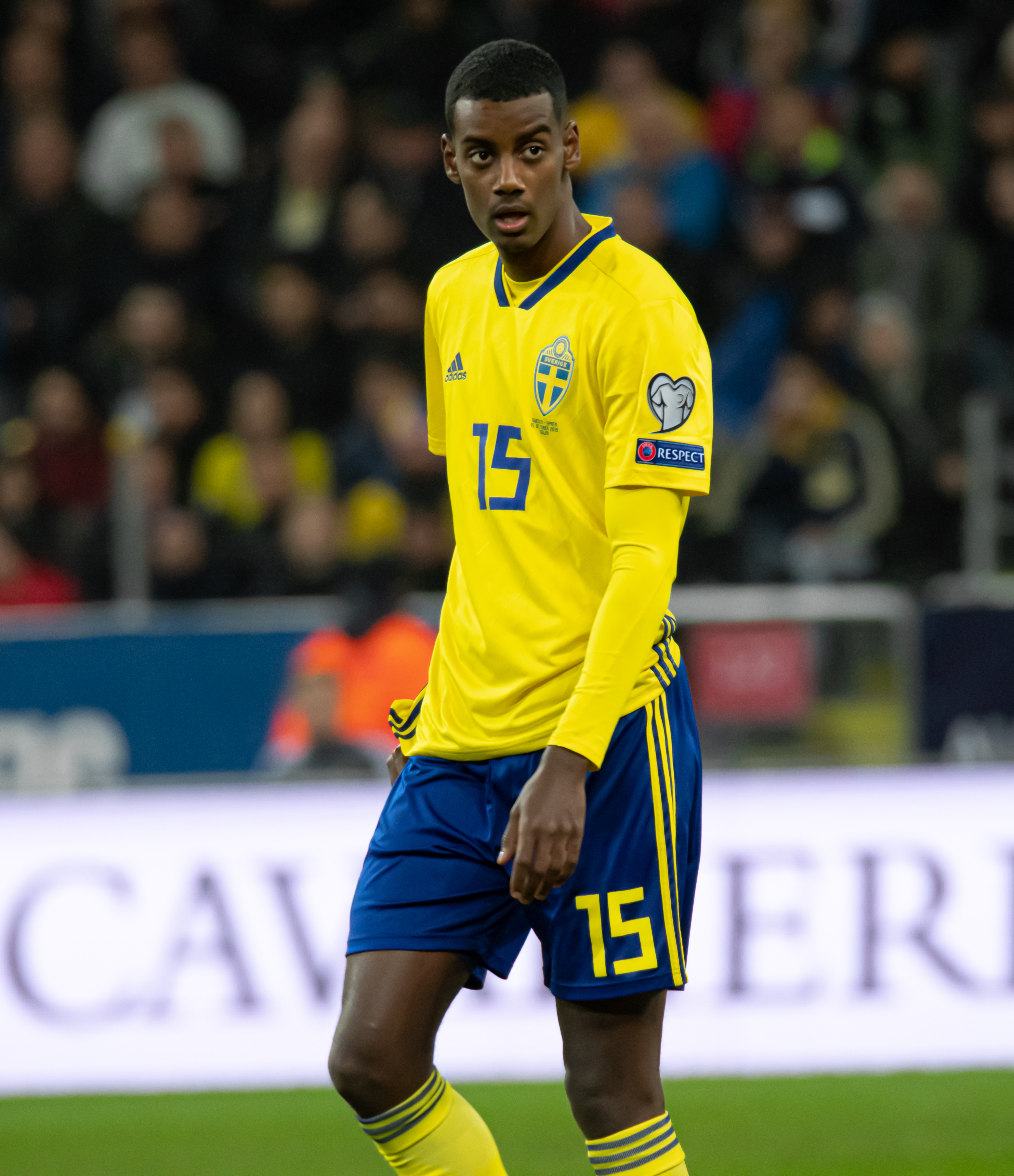 UEFA EURO qualifiers Sweden vs Spain 20191015